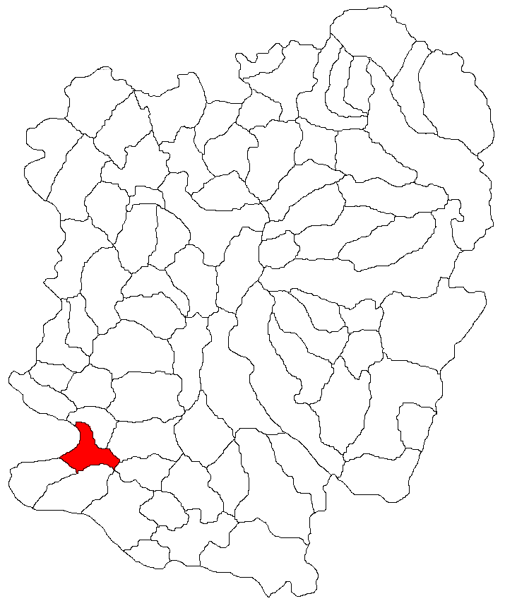 Categorie:Hărţi ale judeţului Caraş-Severin